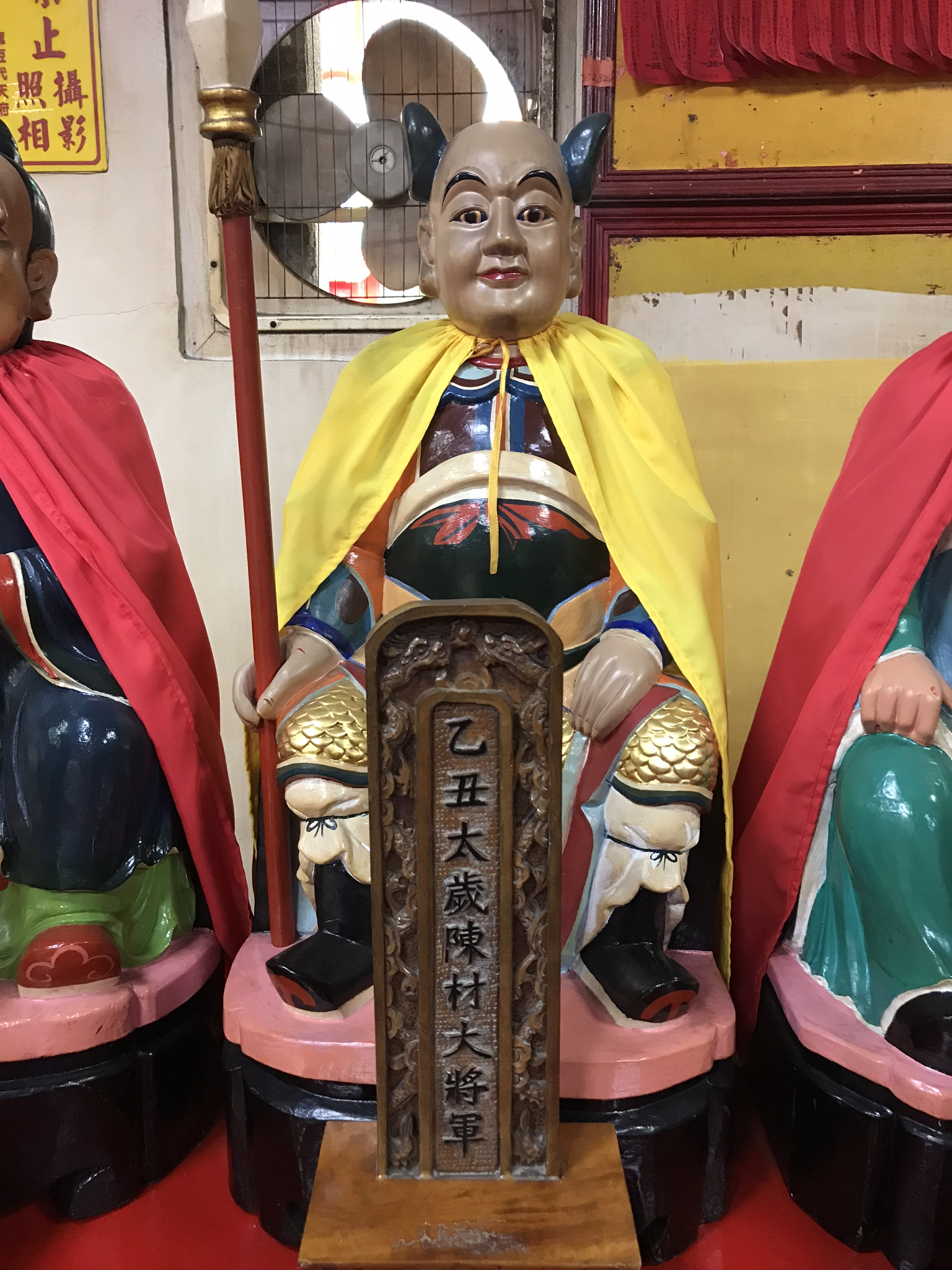 麻豆代天府乙丑太歲陳材大將軍神像